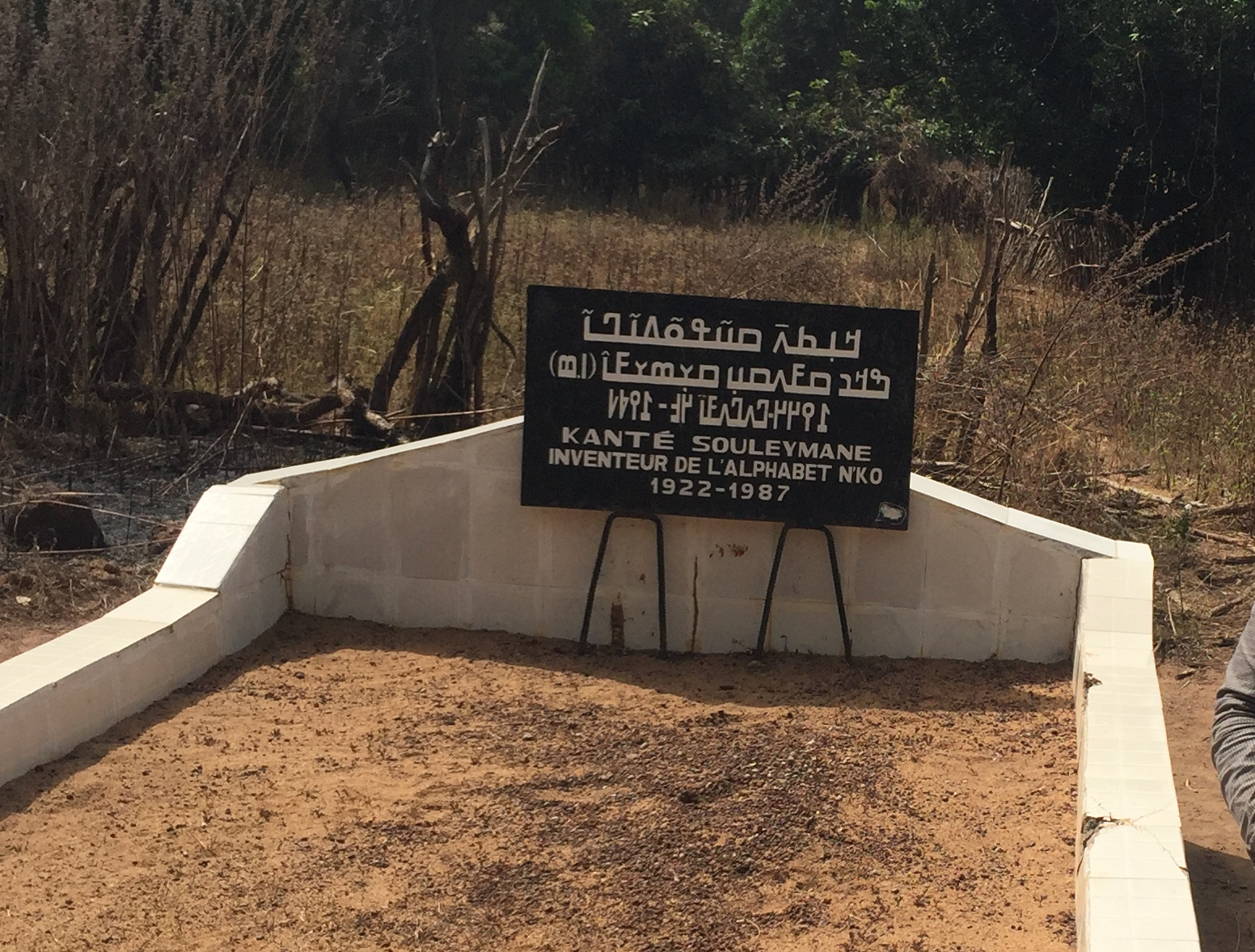 ߊߟߊߡߊ߬ ߘߌ߬ߢߍ߬ ߞߍ߫ ߊ߬ ߡߊ߬